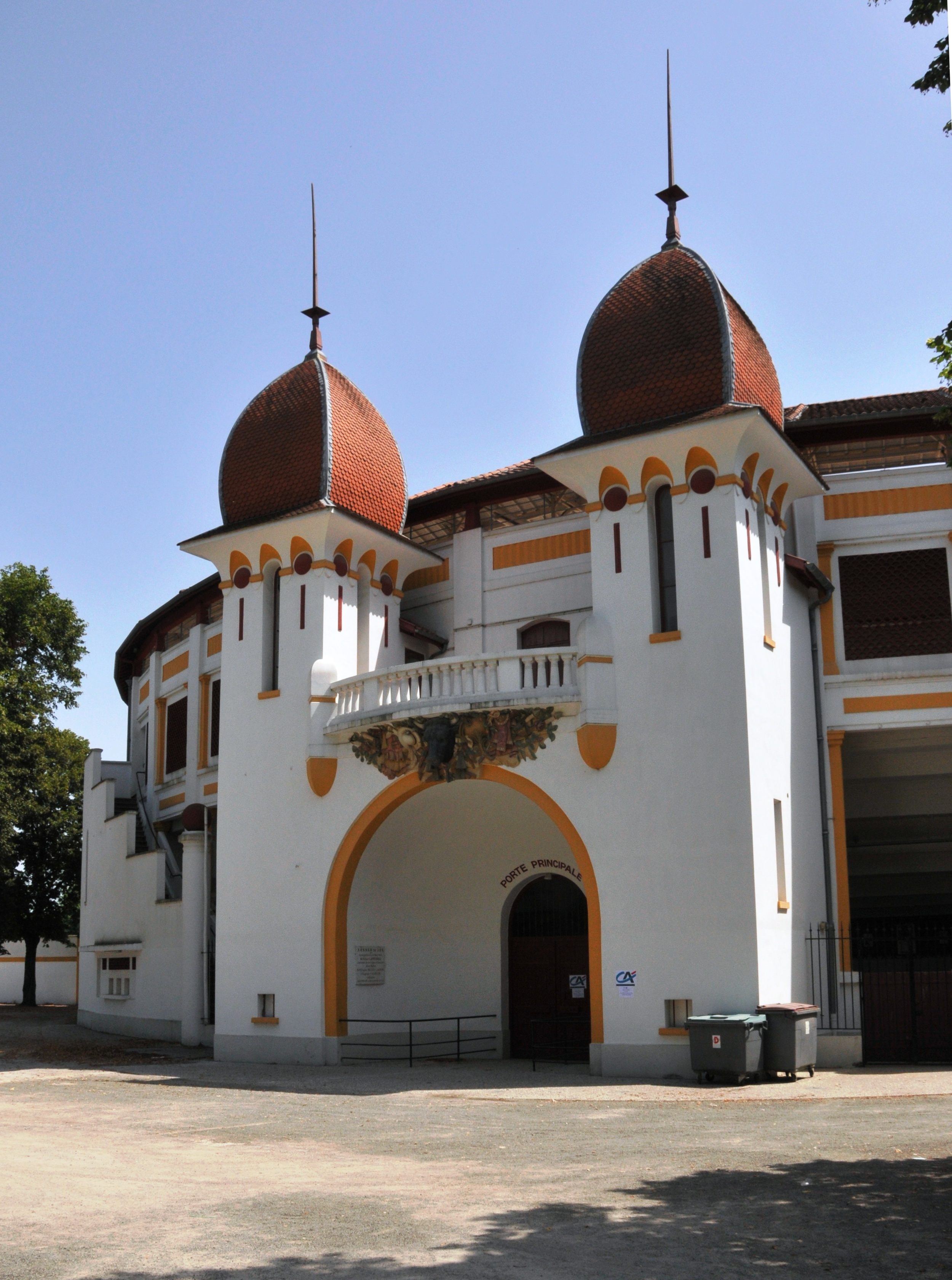 Stierkampfarena in Dax